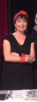 Photo prise par moi lors de la conférence de Françoise Moréchand par Ufe-Japon en avril 2017